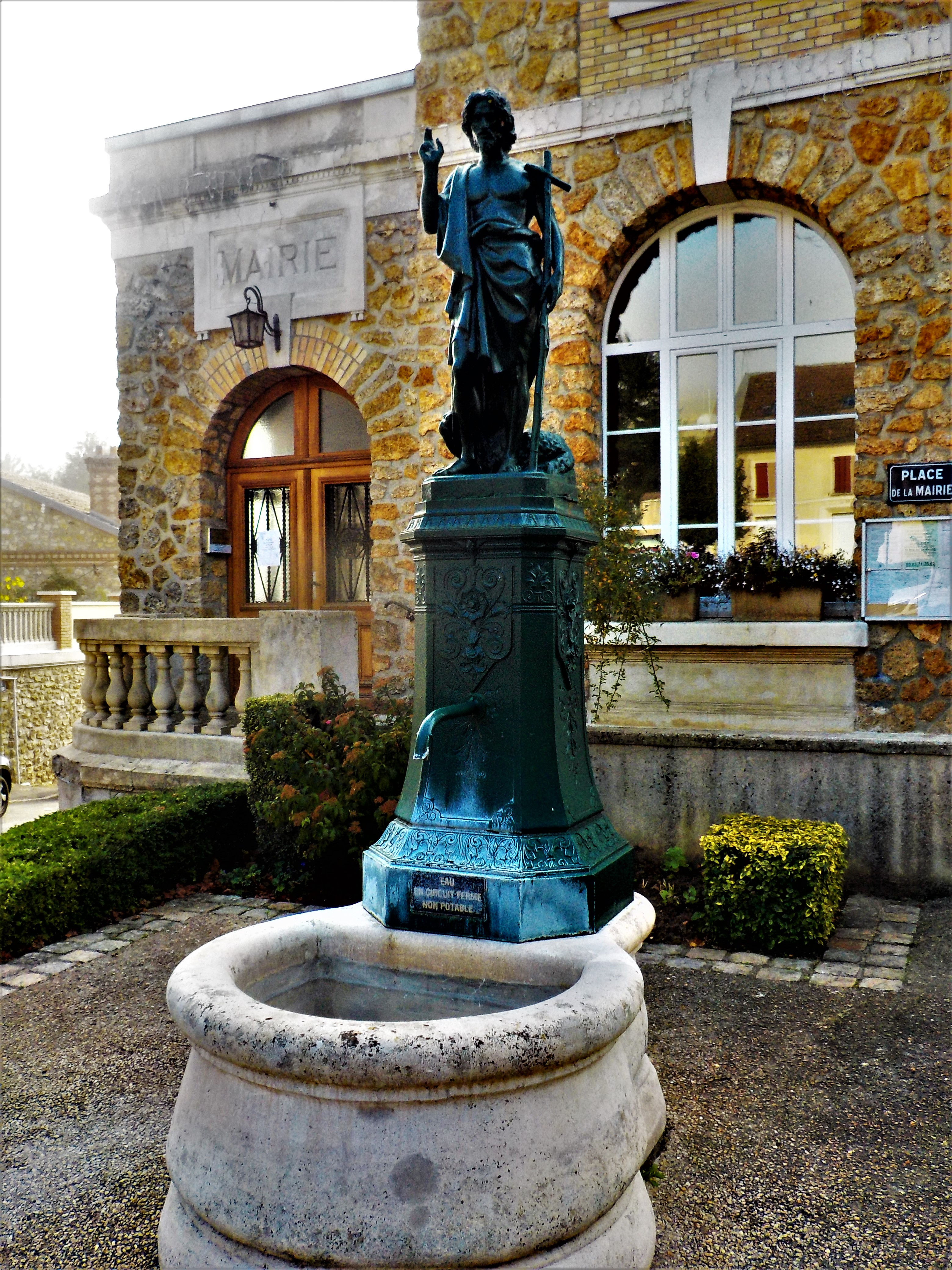 La fontaine Saint Jean-Baptiste, à Jaulgonne, une mâtiné d'automne.